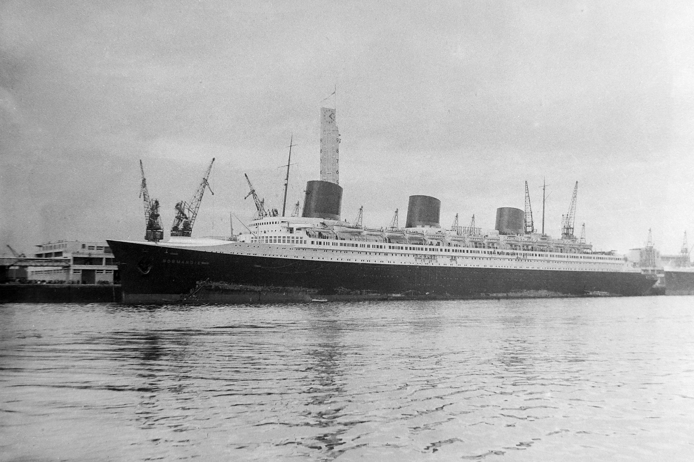 Le paquebot Normandie à la gare maritime du Havre